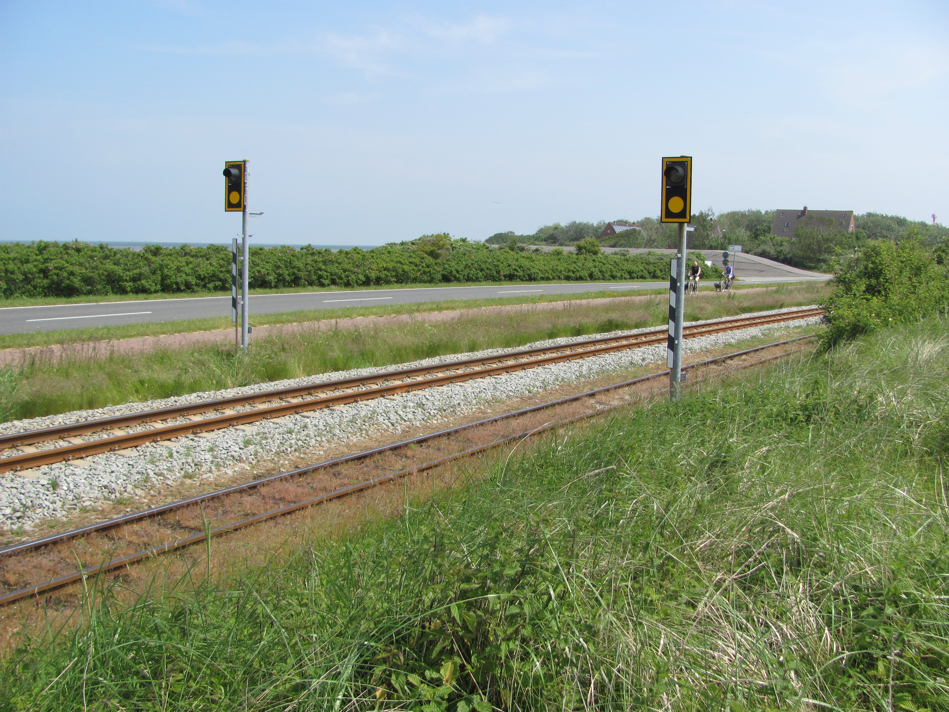 BÜ-Signale an der Strecke der BKB